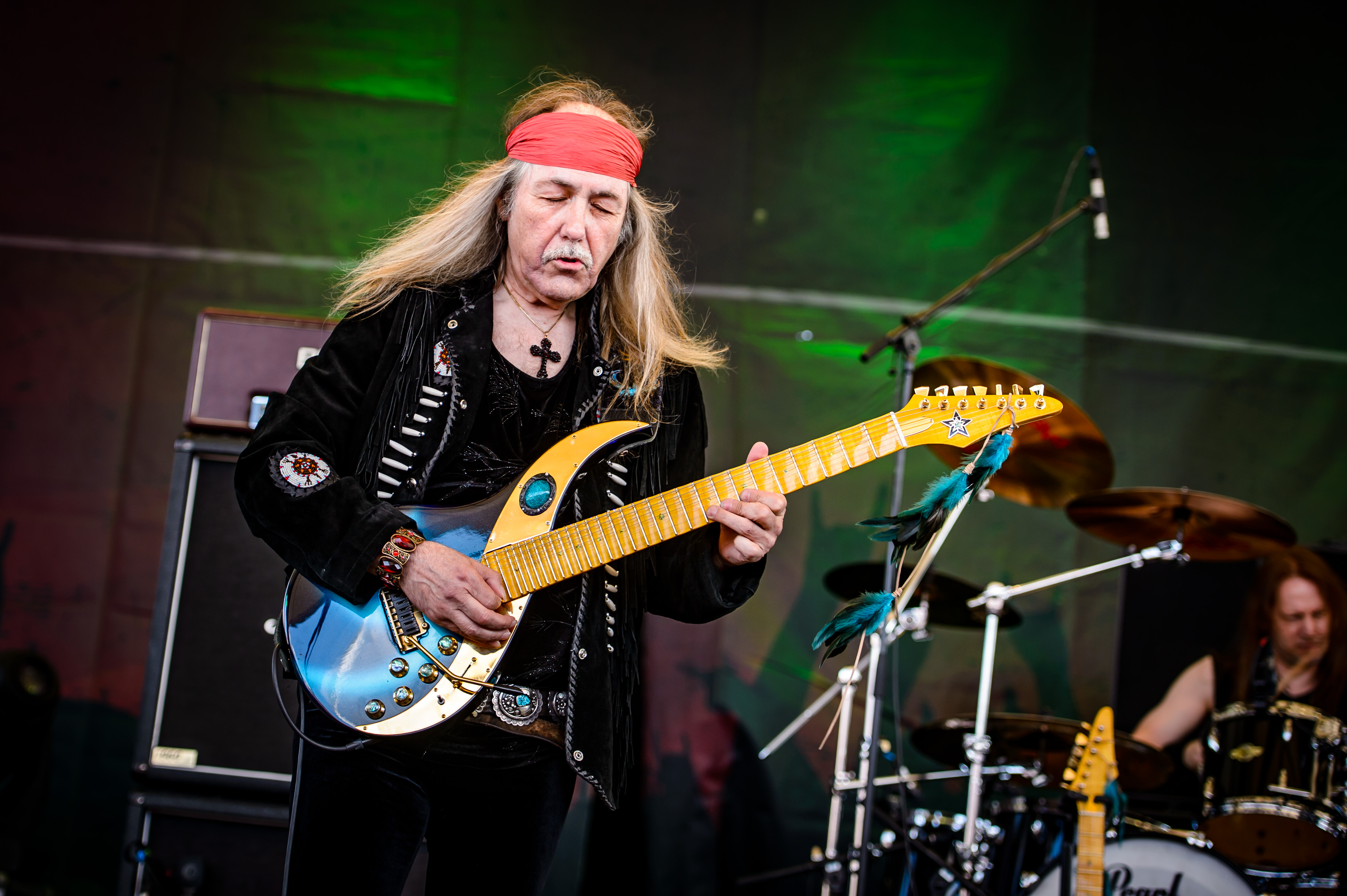 'Rock Hard Festival 2018; Amphitheater Gelsenkirchen': 'Uli Jon Roth'